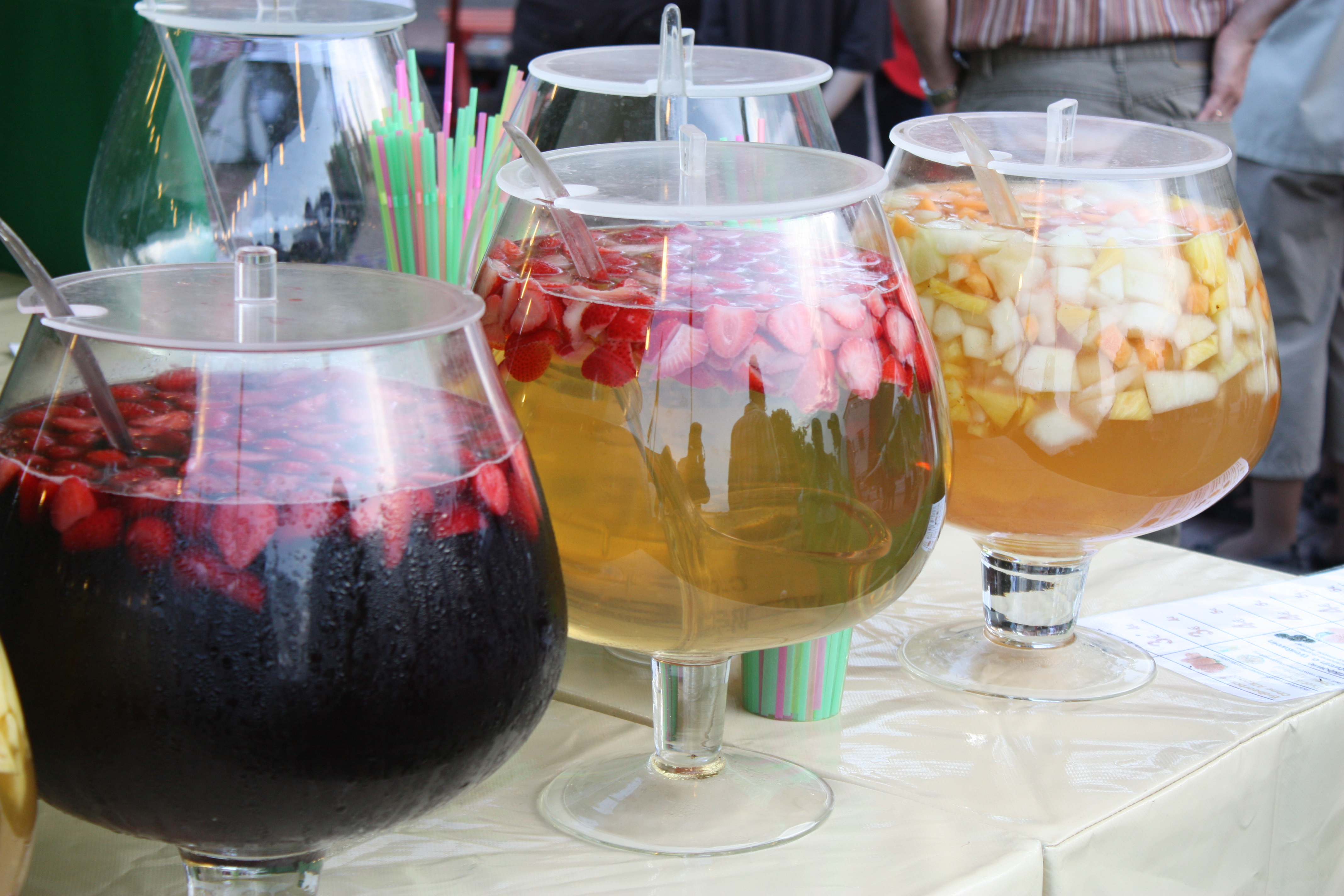 Früchtebowle, Steinhude